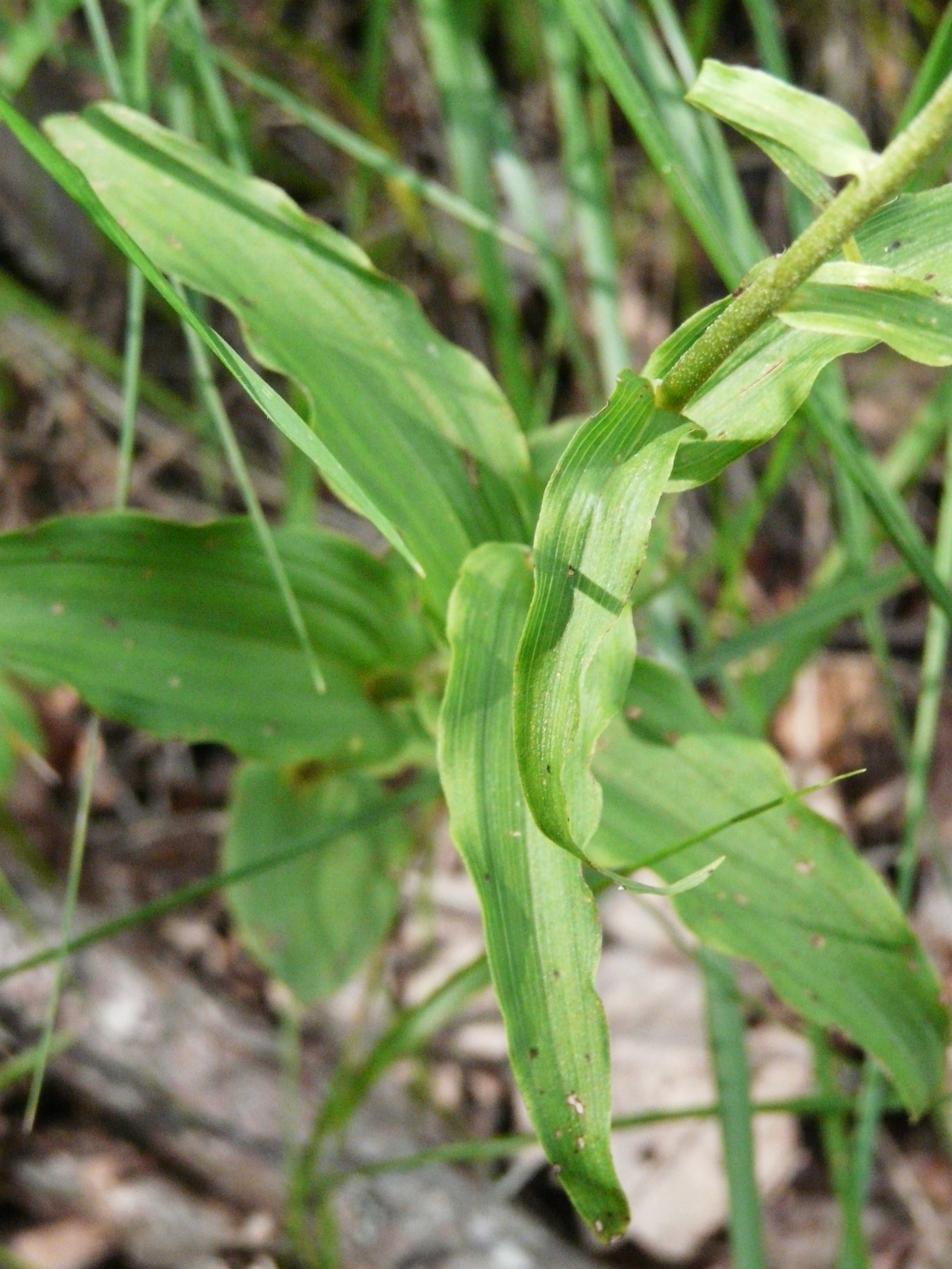 Feuilles d'Épipactis de Müller (Epipactis muelleri), Trélissac, Dordogne, France